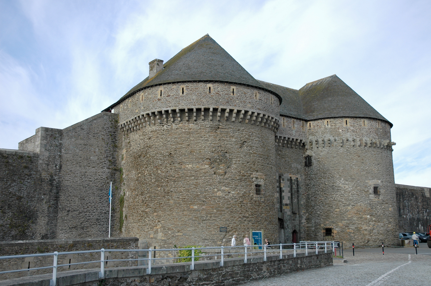 Château de Brest, les tour paradis